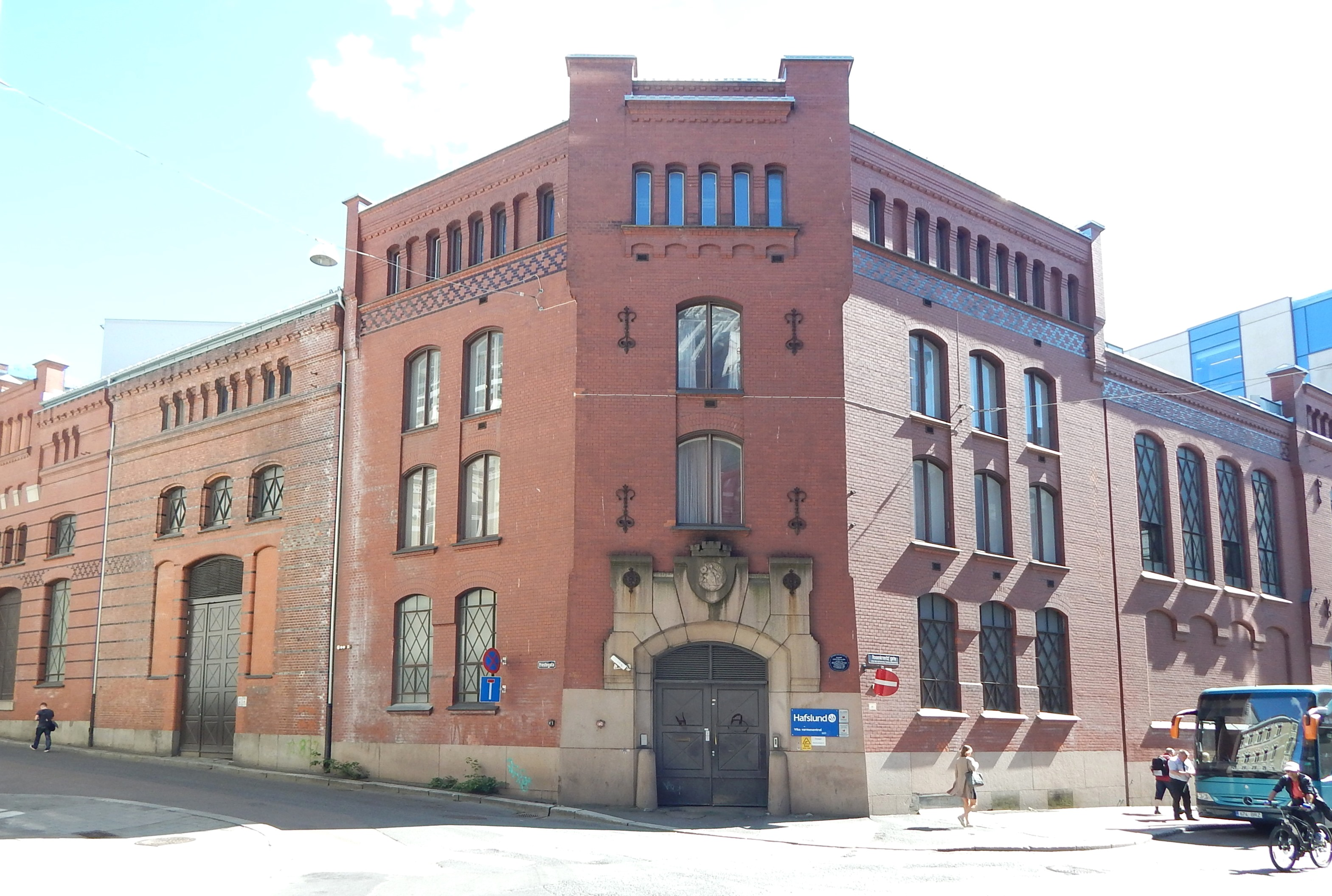 Oslo Lysverkers dampstasjon, «Dampcentralen». Arkitekt: Holm Hansen Munthe (1892). Senere ombygget.